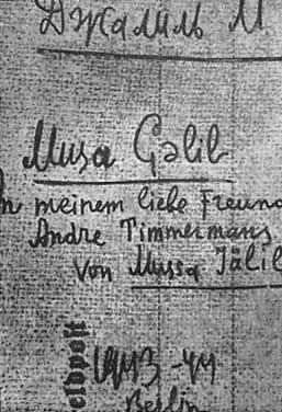 Musa Cälil's Moabit Notebooks